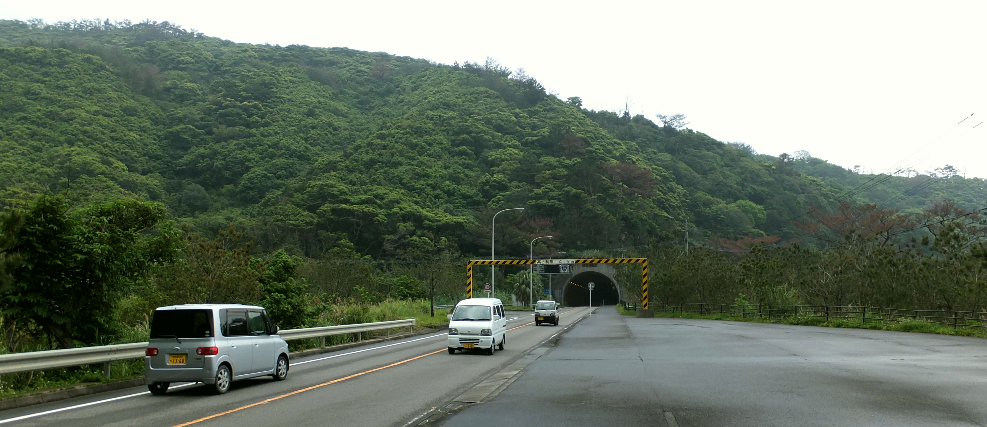 小和瀬トンネル周辺(西側)